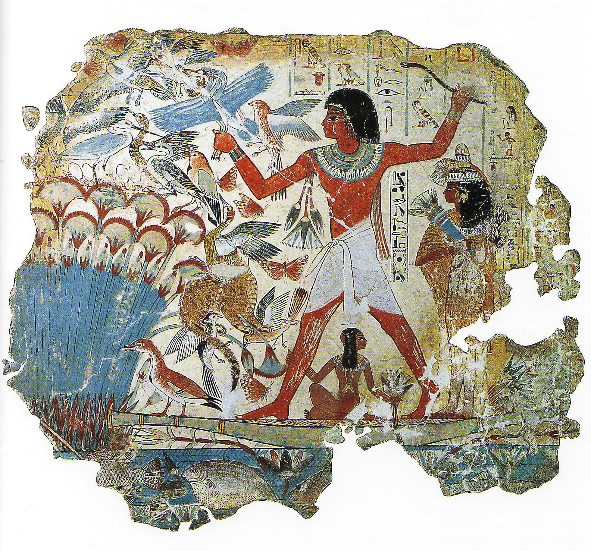 Jagd im Papyrusdickicht; Ausschnitt aus einer Wandmalerei im Grab des Nabamun in Theben-West, heute im British Museum, Tempera auf Putz, Höhe 81cm, 18. Dynastie, vor 1350 v. Chr.